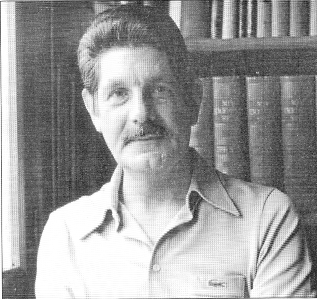 Retrato del escritor Óscar Muñiz Martín (1930-1997)